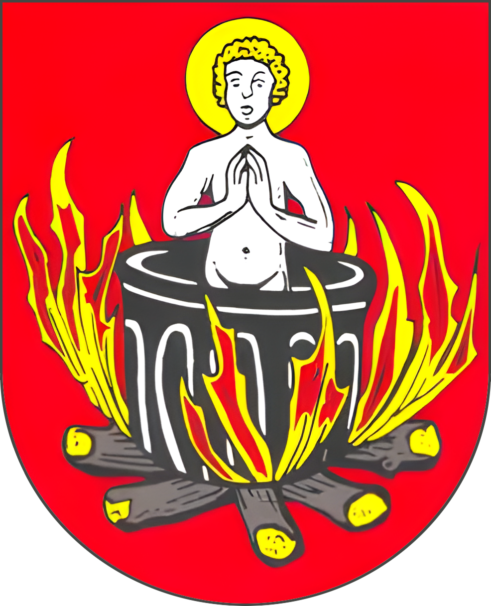 Gemeinde Sankt Veit im Pongau: Im roten Schilde die Darstellung des hl. Veit, nämlich der unbekleidete Oberkörper eines jugendlichen Mannes mit zum Gebet gefalteten Händen und goldnimbiertem Haupte, der aus einem auf einem niedrigen, brennenden Scheiterhaufen ruhenden schwarzen Kessel hervorragt